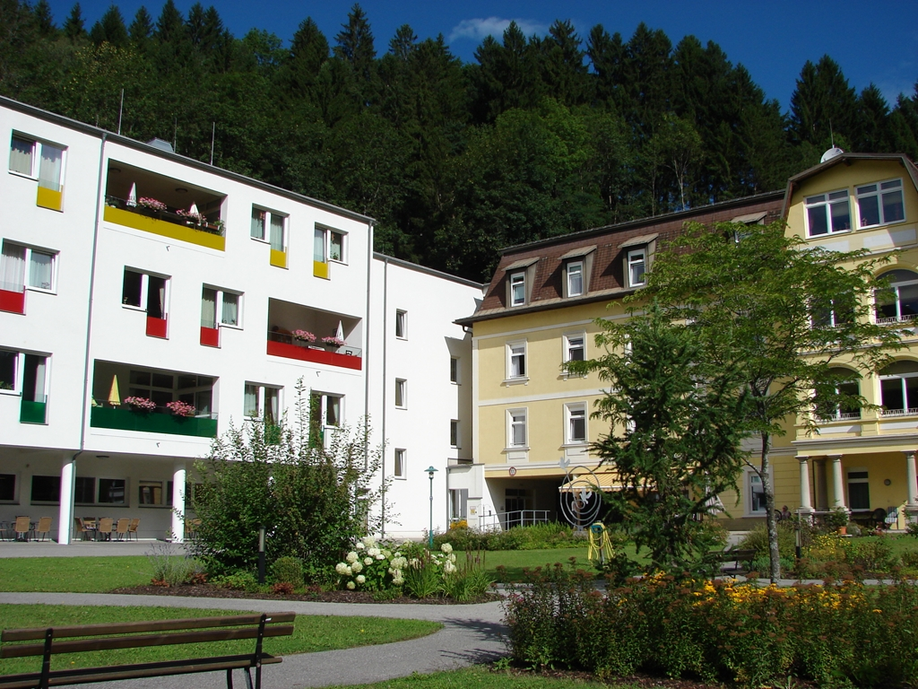 Altenwohn- und Pflegeheim Marienheim in Spittal/Drau